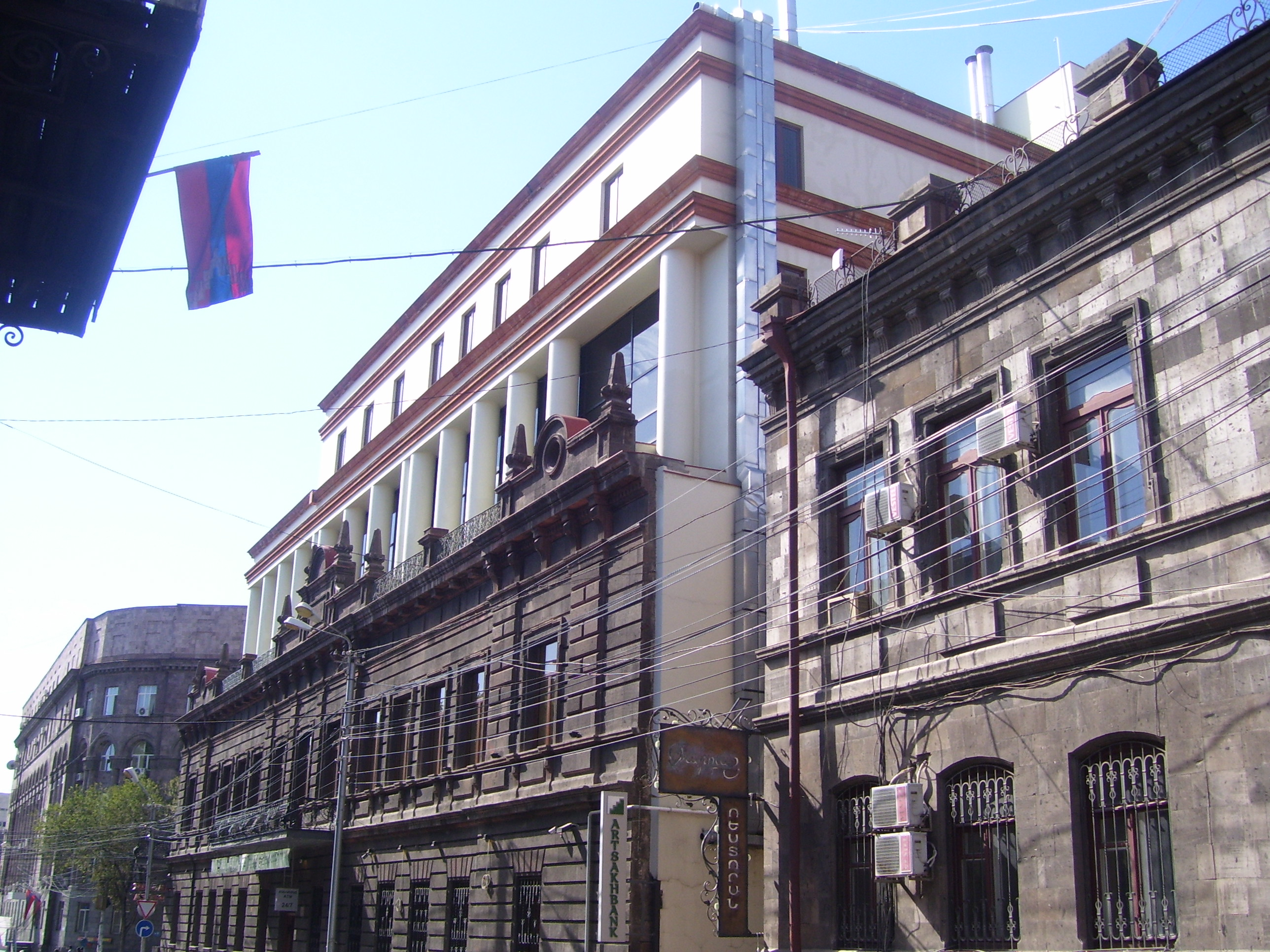 Հանրապետության փողոցի կառուցապատման հատվածներ. Նահանգական փողոցը 1889 թ.-1920 դ. սկիզբ 6/203